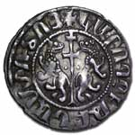 Maneta Of kilikiyskogo Armenian reign, 1048-1375. Source: Ruskana Wikipedia